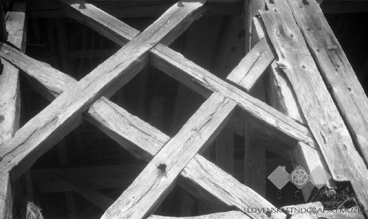 Branasta konstrukcija kozolca, Velike Lipljene.